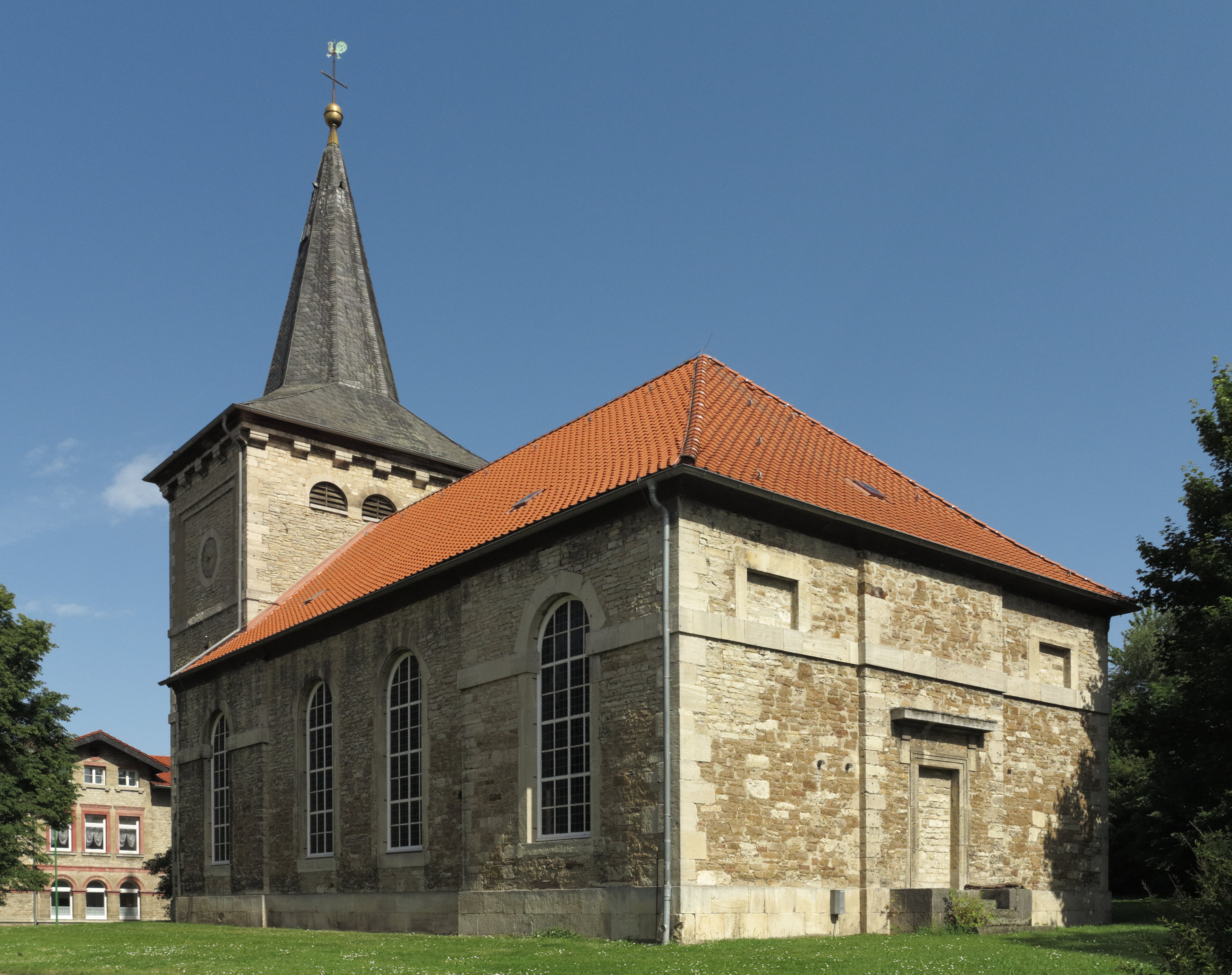 Die 1820 erbaute Kirche St. Marien in Groß Dahlum